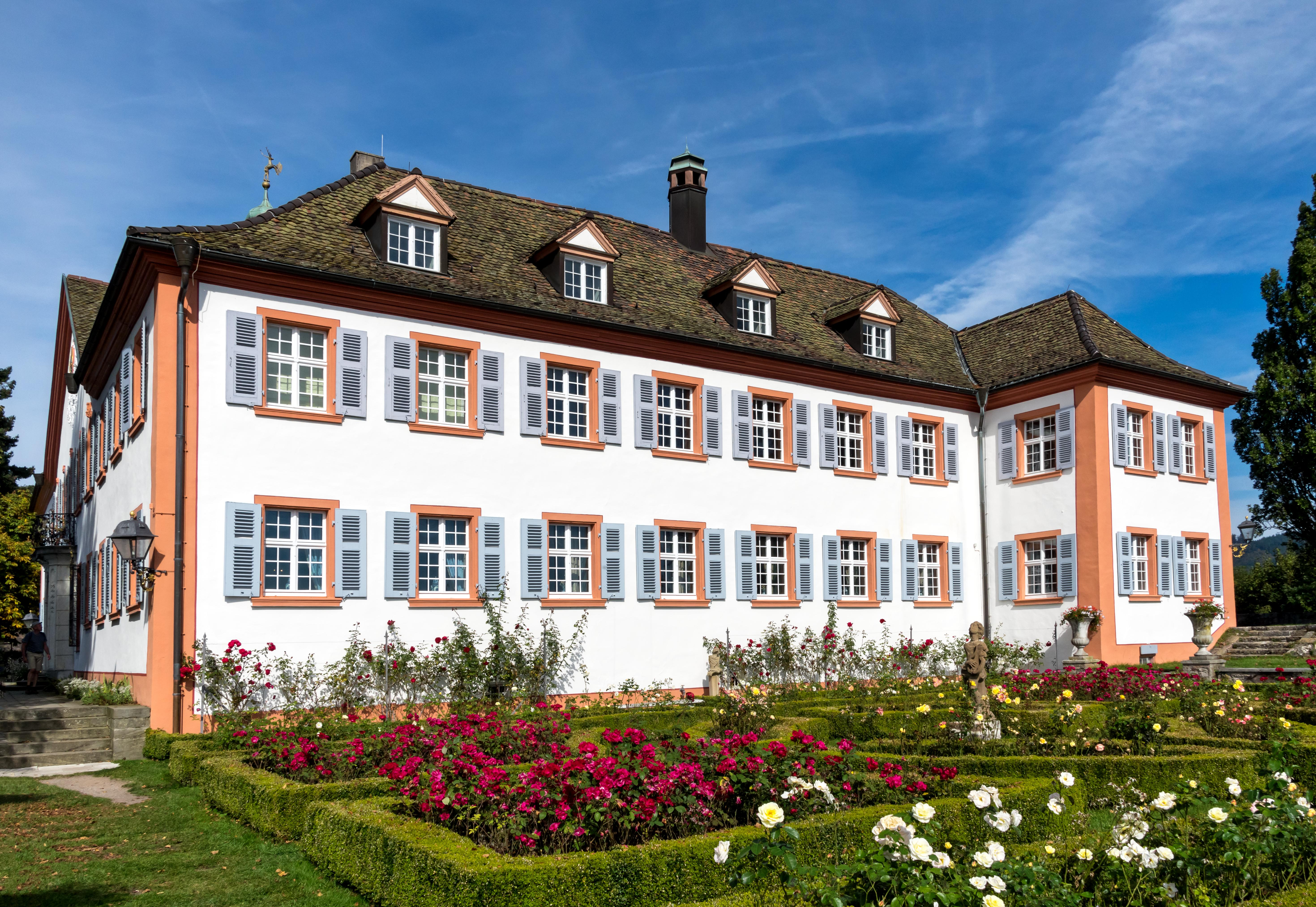 Bilder vom denkmalgeschützten Schloss Bürgeln. Es liegt ca 700m über NN oberhalb von Obereggenen. Nachgewiesen ist der Standort schon vor 1125. Zu Begin stand hier eine Kirchlein "Zum heiligen Johannes". Es wurde 1125 von Werner von Kaltenbach an das Kloster St. Blasien übergeben. Nach einer wechselvollen Zeit in der es von 1690 bis 1715 in der es als Poststation der Reichspostgeneralats von Thurn und Taxis genutzt wurde, ist es ab 1762 von Franz Anton Bagnato in ein Rokoko-Schloß umgewandelt. Seit 1920 ist das Schloß im Besitz des Bürgeln Bundes. Den Blick von der Schlossterrasse beschreibt deutscher Schriftsteller, Theologe und Pädagoge Johann Peter Hebel, der als der bedeutendste alemannische Mundartdichter.gilt : "Z’Bürgeln auf der Höh, nai was cha meh seh! O, wie wechsle Berg un Tal, Land und Wasser überall, z’Bürgeln auf der Höh!" Das Kulturdenkmal Schloß Bürgeln, als Anlage und mit Detailaufnahmen Aussenansichtn des Hauptgebäudes